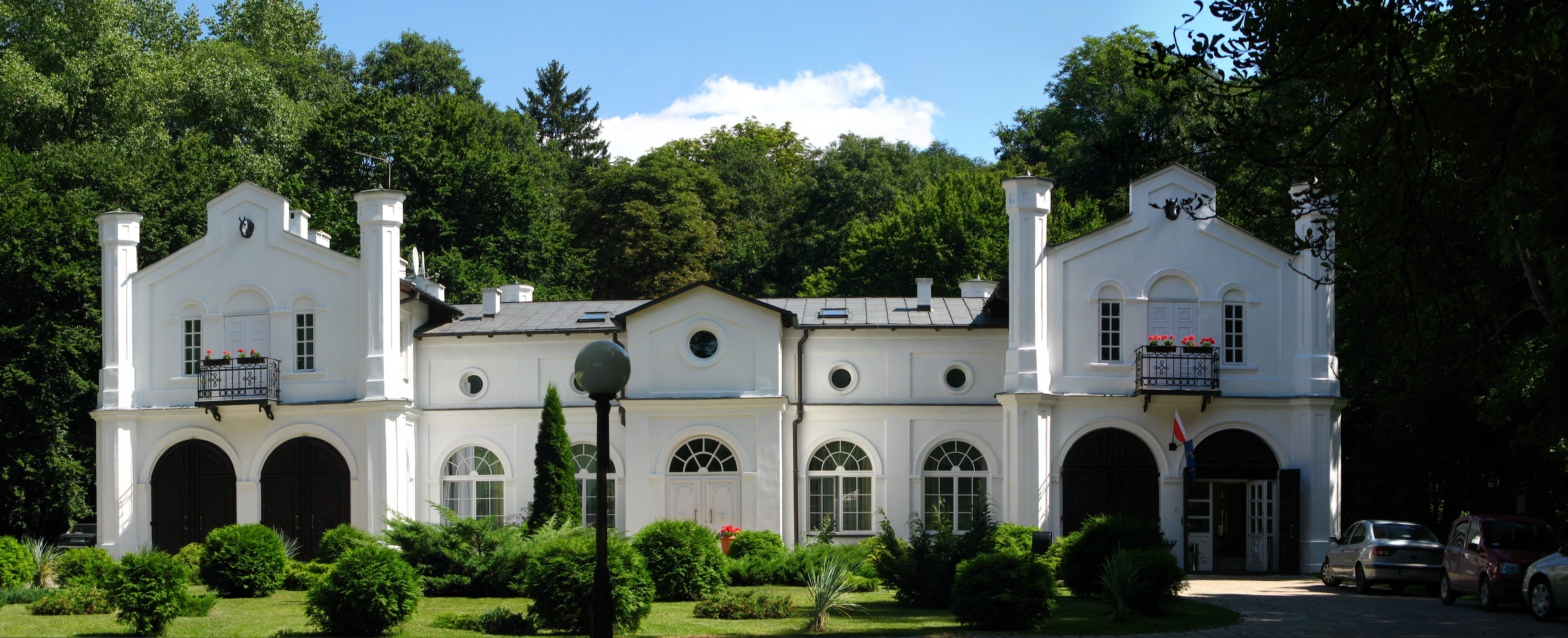 Zespół dworski i folwarczny: - dwór (1830) - stajnia (1830) - park z aleją dojazdową (2 poł. XIX) - gorzelnia (1888) - 2 magazyny (1888) - obora (1888) Roskosz, gmina Biała Podlaska 02.1967 i.